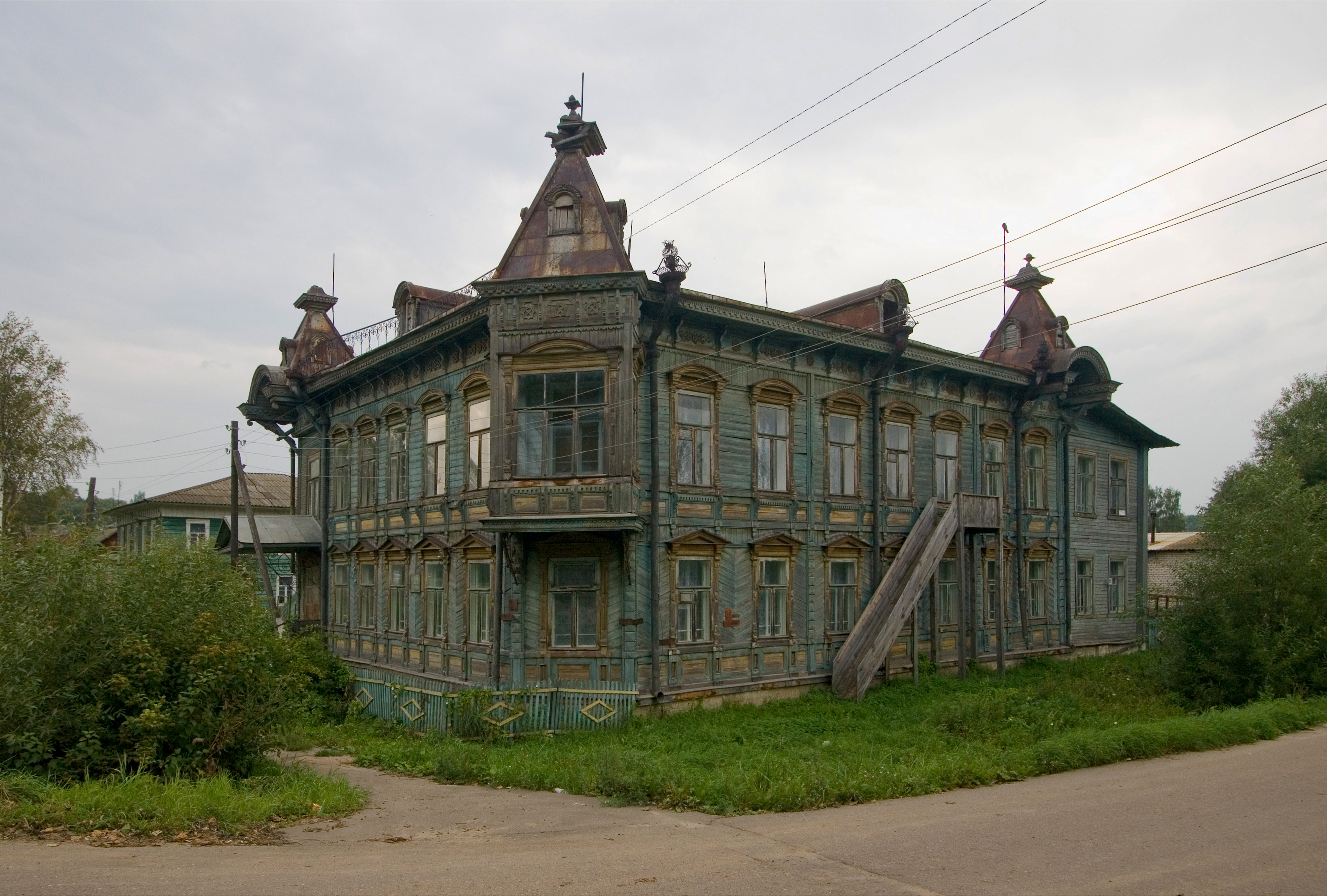 Тверская область